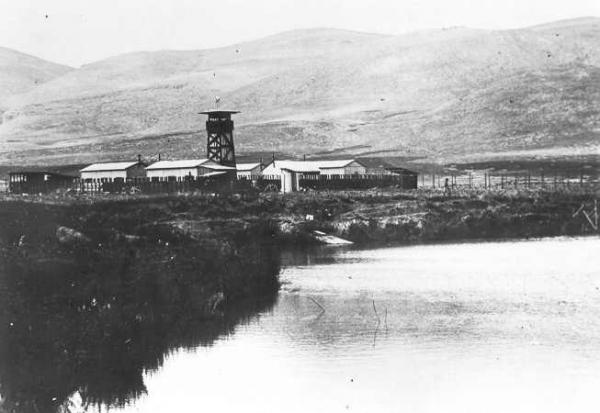 מחנה חומה ומגדל, קיבוץ תל עמל (ניר דוד) על גדות האסי. ראשון יישובי "חומה ומגדל".